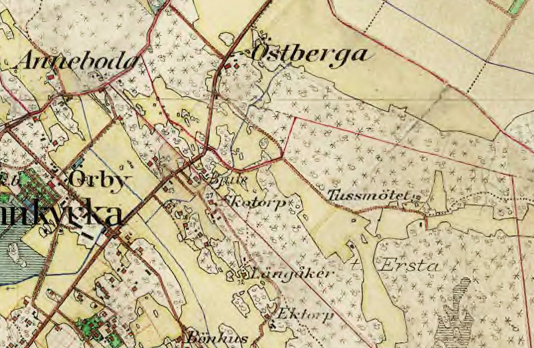 Tussmötetorpet i Stureby (revs 1937)